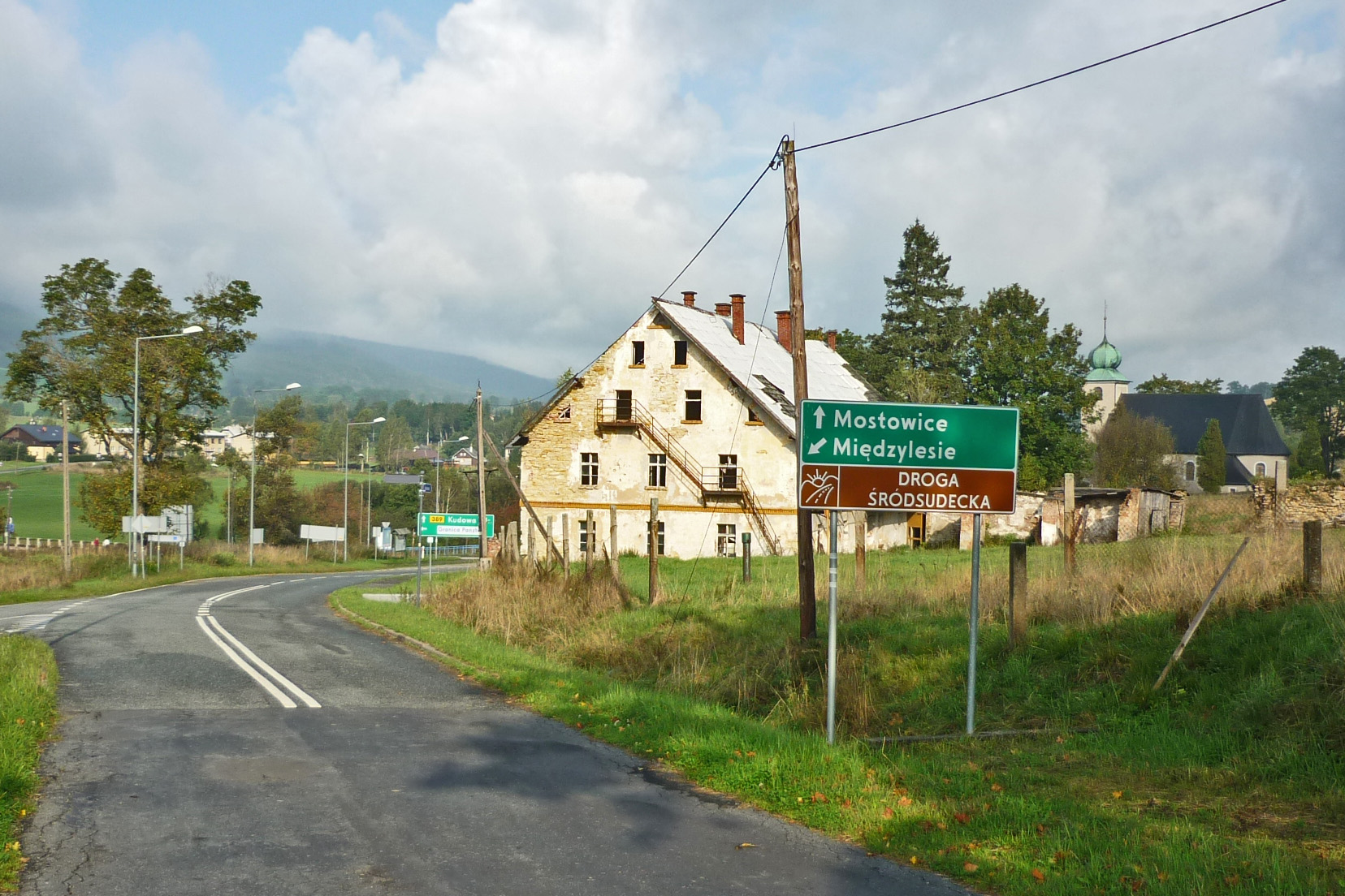 Sudetenstraße DW389 in Langenbrück (Mostowice) in Schlesien